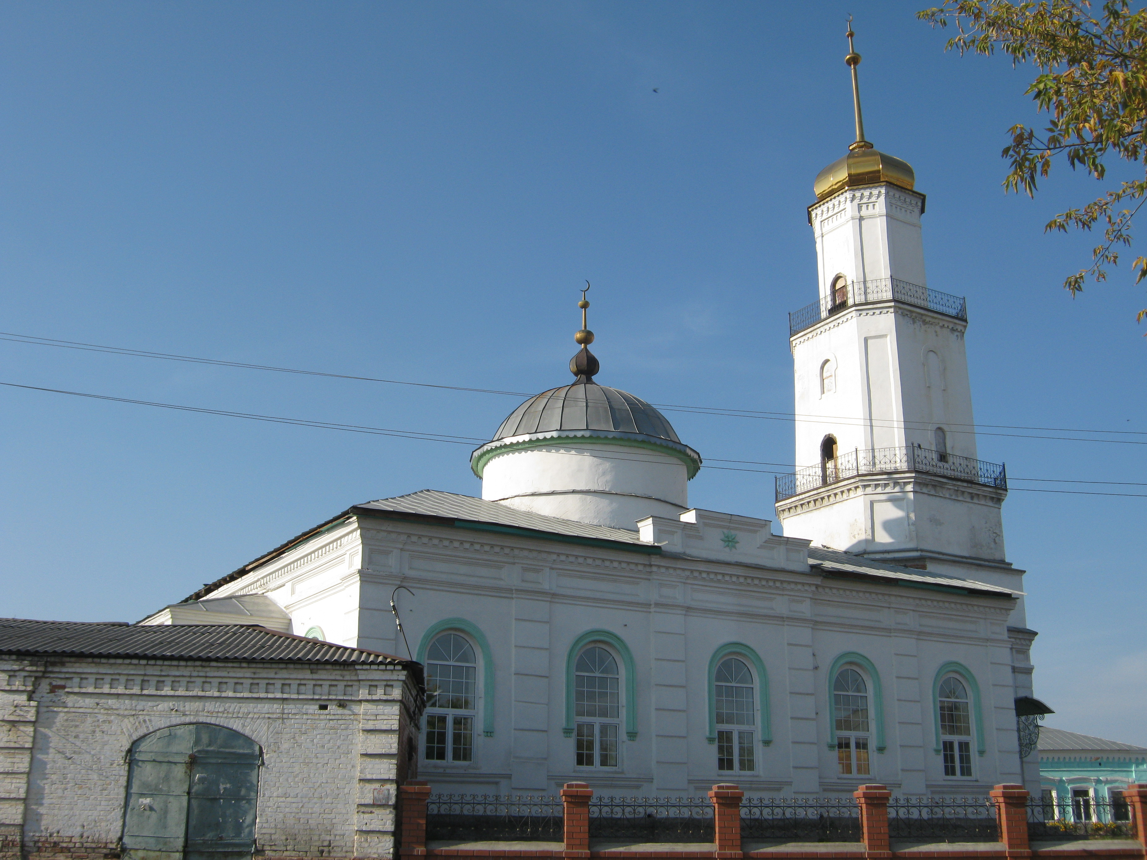 Здание Мечети в городе Троицке